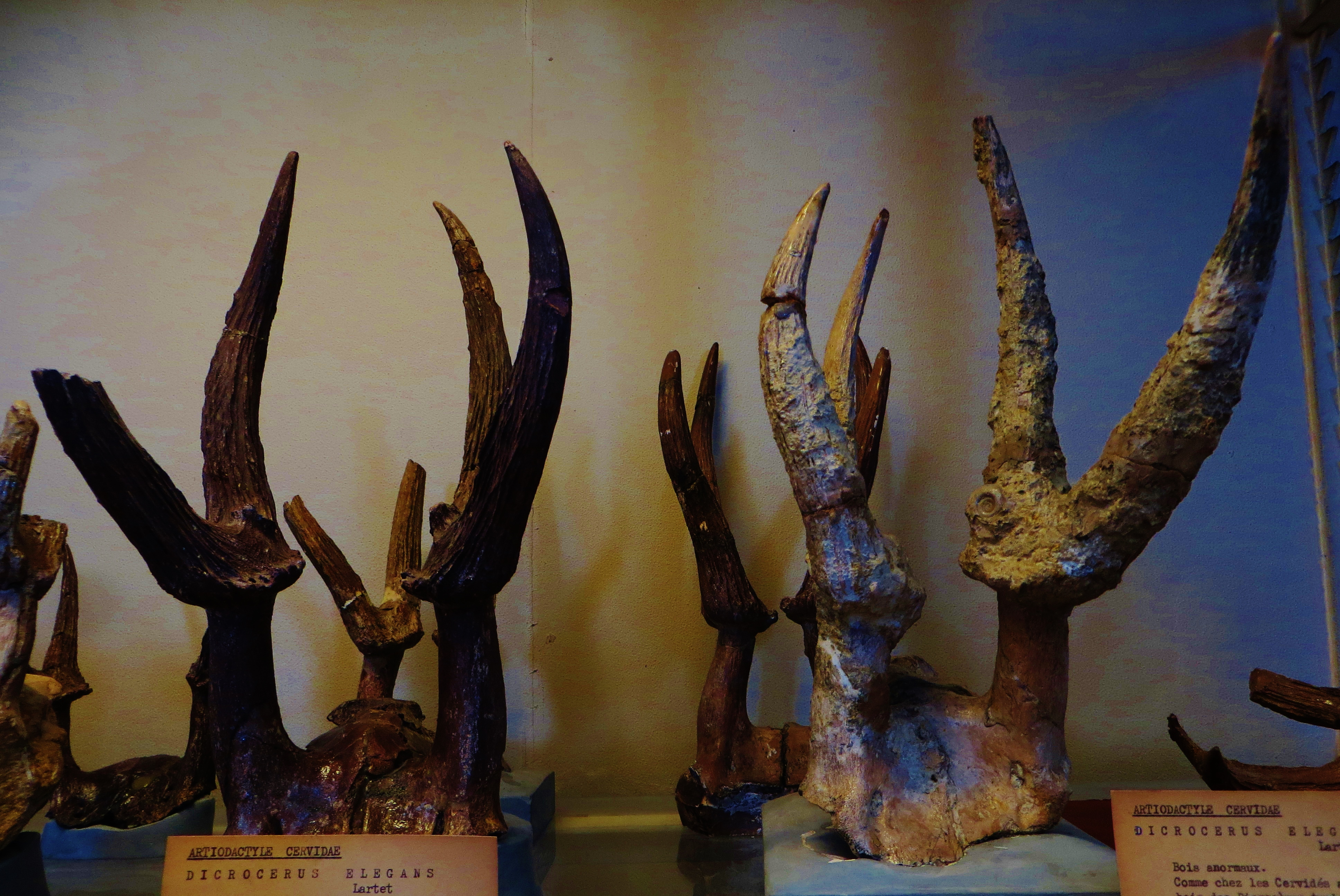 Fossil of Dicrocerus, an extinct mammal - Took the photo at Musee d'Histoire Naturelle, Paris